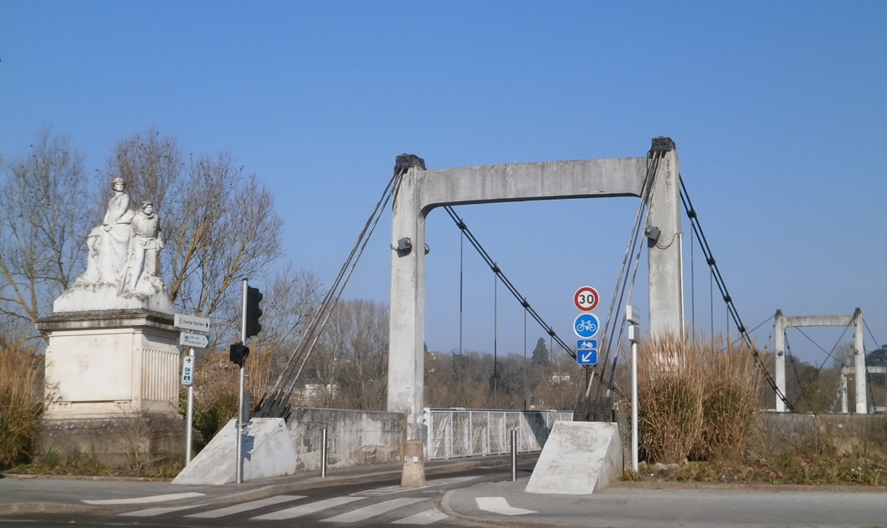 La passerelle Saint-Symphorien et le monument commémoratif.